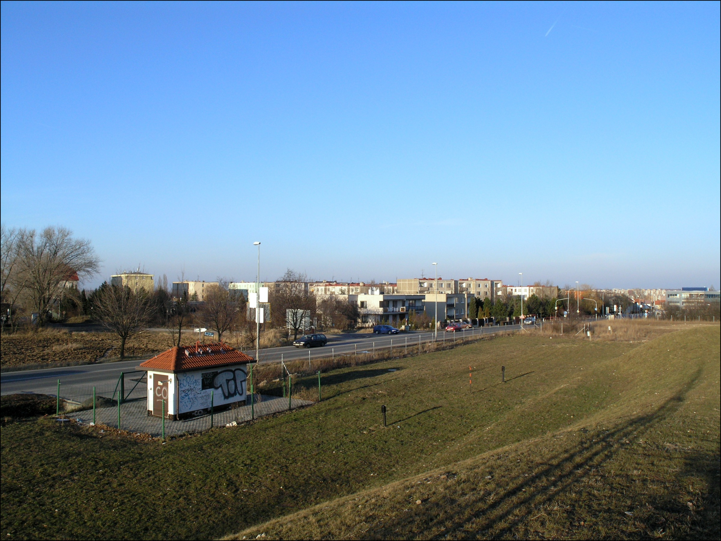 Praha, Zličín - pohled od Řevnické ulice přes ulici Na Radosti